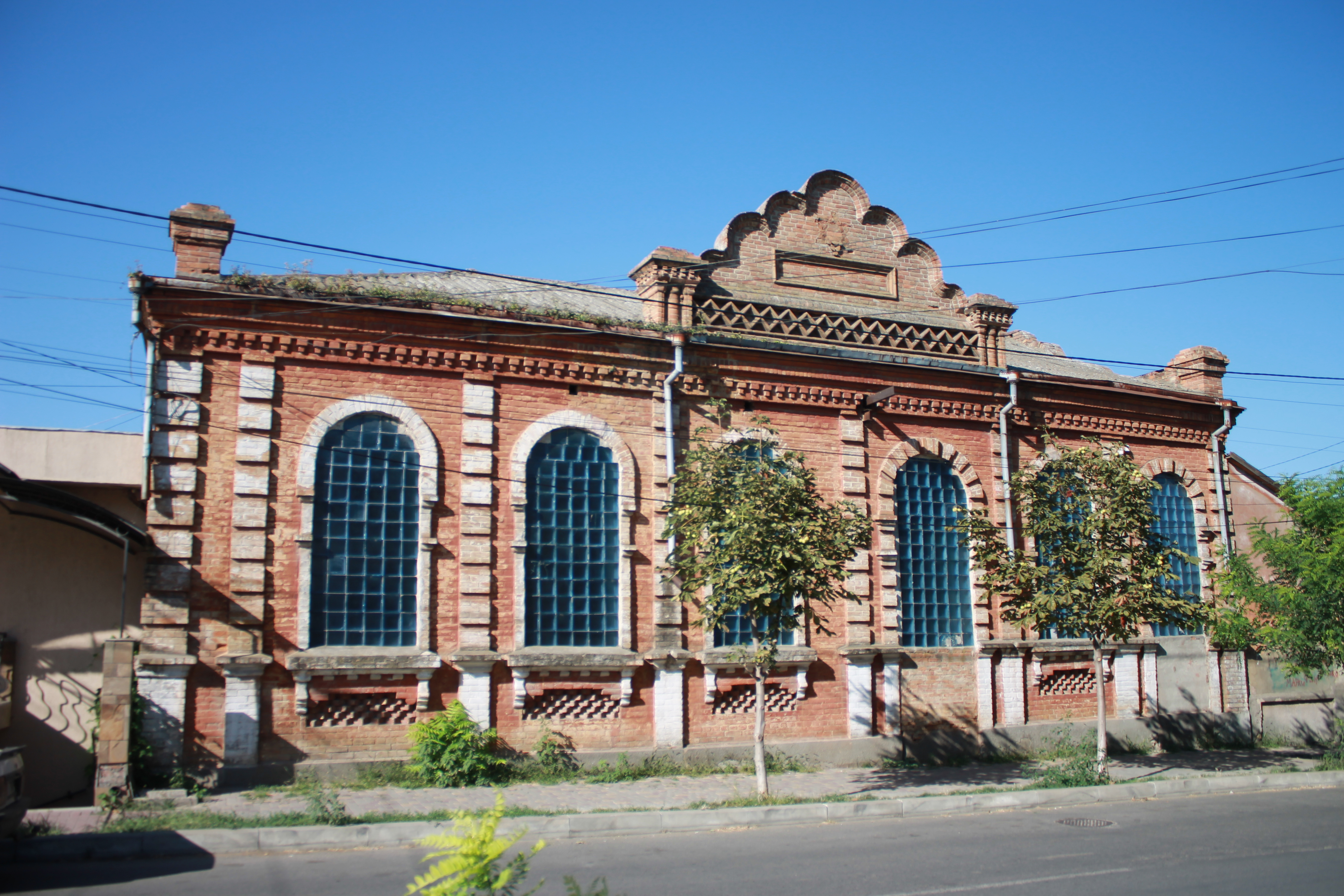 Колишня синагога 1891р., вул. Єврейська, 29, м. Білгород-Дністровський, Одеська обл.